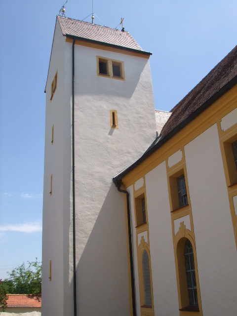 Pfarrkirche St. Jakob, Dürrenwaldstetten, Gemeinde Langenenslingen (Kreis Biberach)